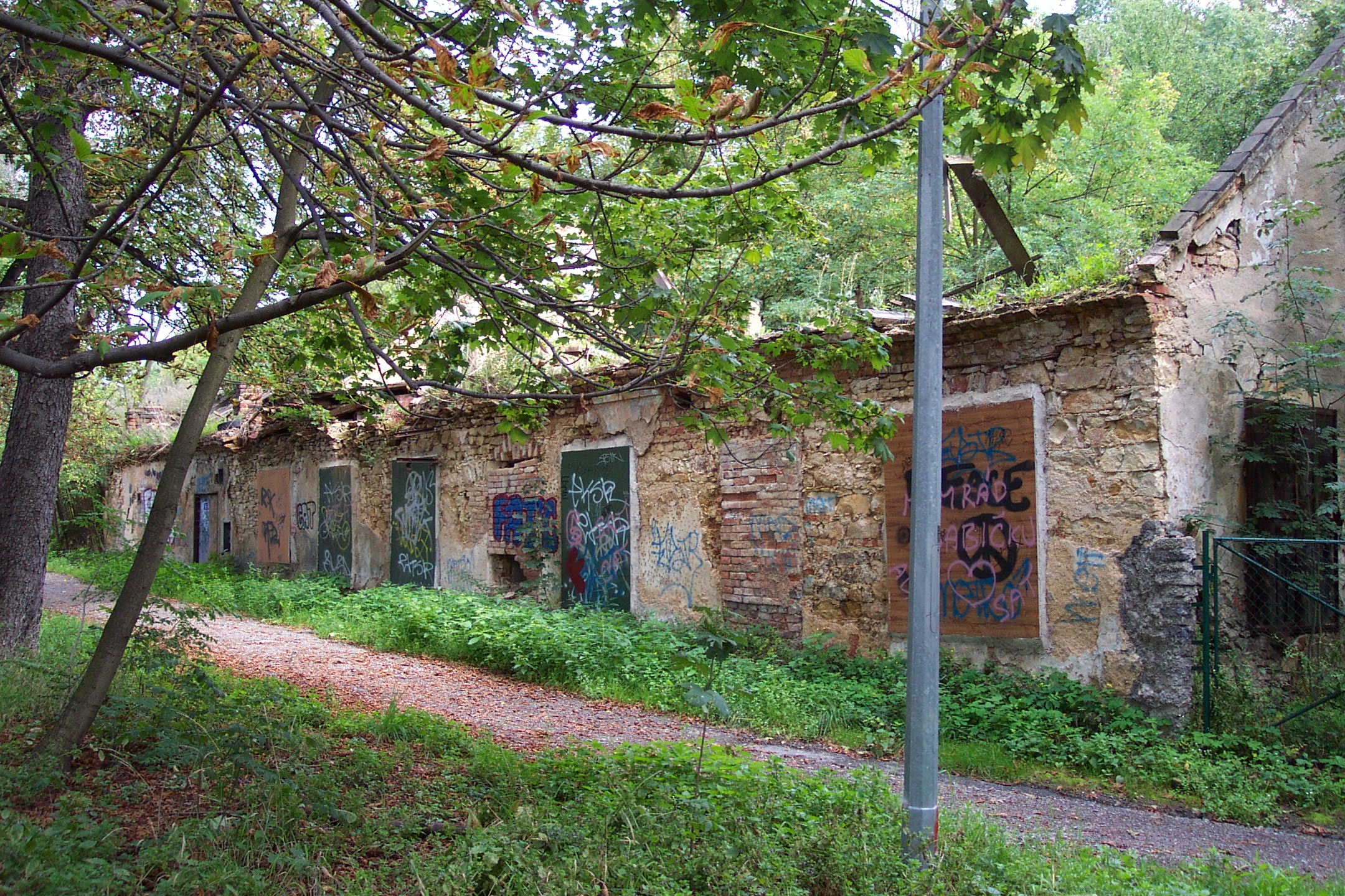 Usedlost Zlatnice v Praze - The Zlatnice in Prague